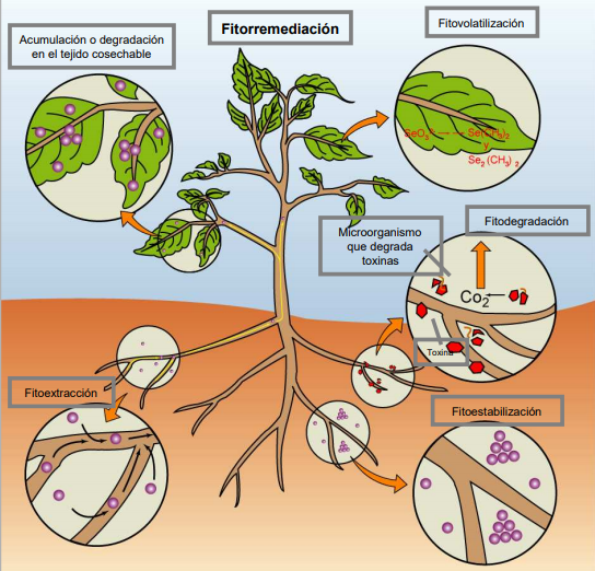 esquema del procesamiento de contaminantes